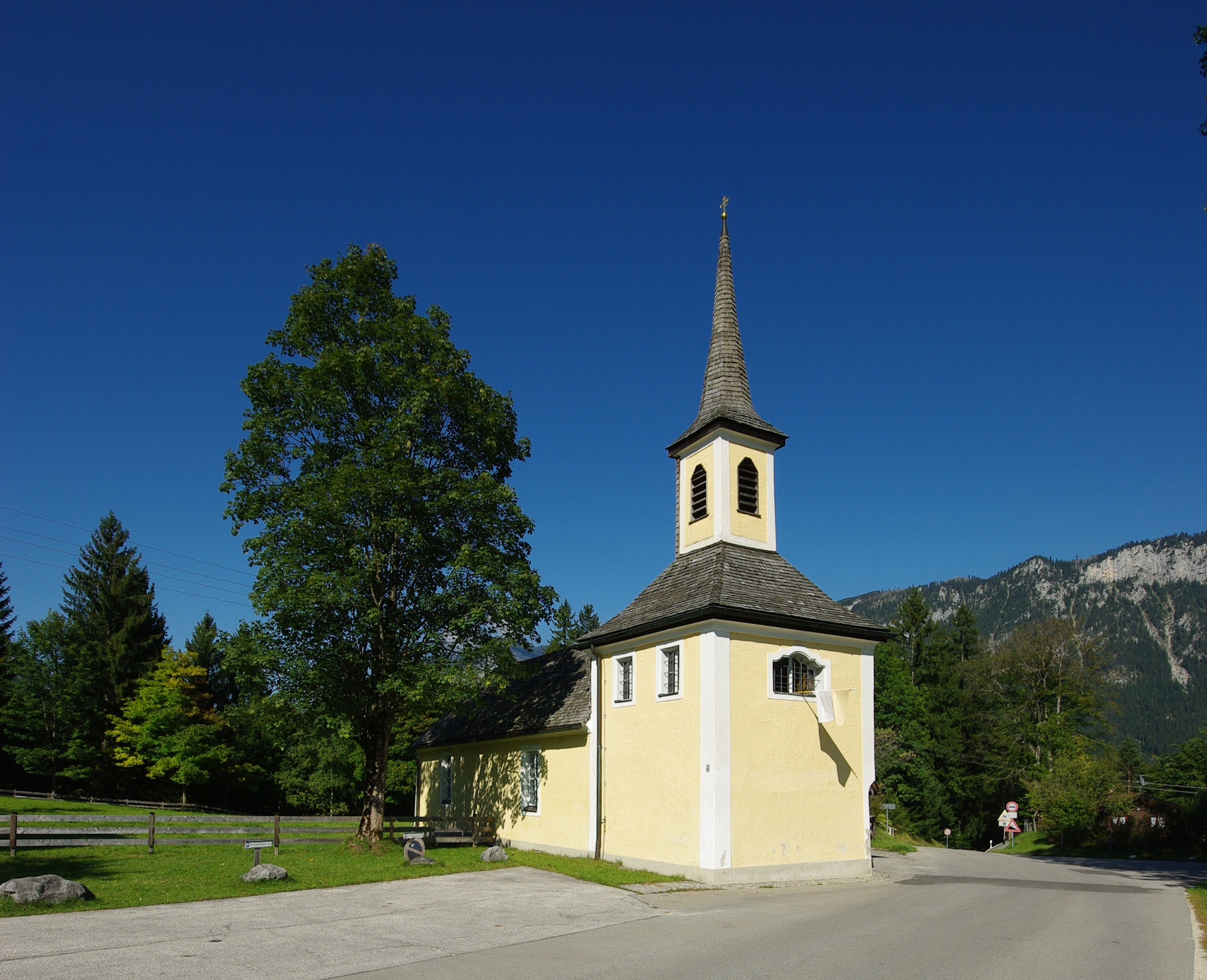 Thanngasse 10, 83483 Bischofswiesen (Loipl); Kath. Kapelle St. Maria Innenraum zugehörige Ölbergkapelle zugehöriger Brunnen This is a photograph of an architectural monument.